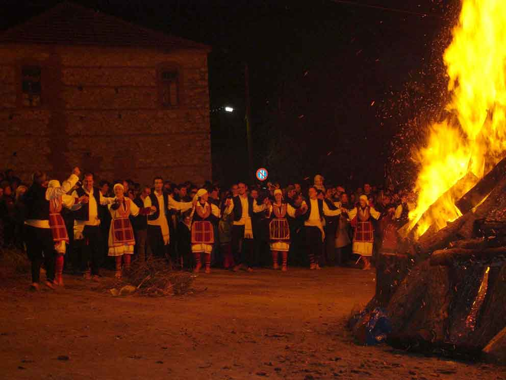 Στιγμιότυπο από το βράδυ της αναβίωσης του εθίμου την ώρα που χορεύει γύρω από τη φωτιά το χορευτικό τμήμα του συλλόγου Αμύντα Αμυνταίου.